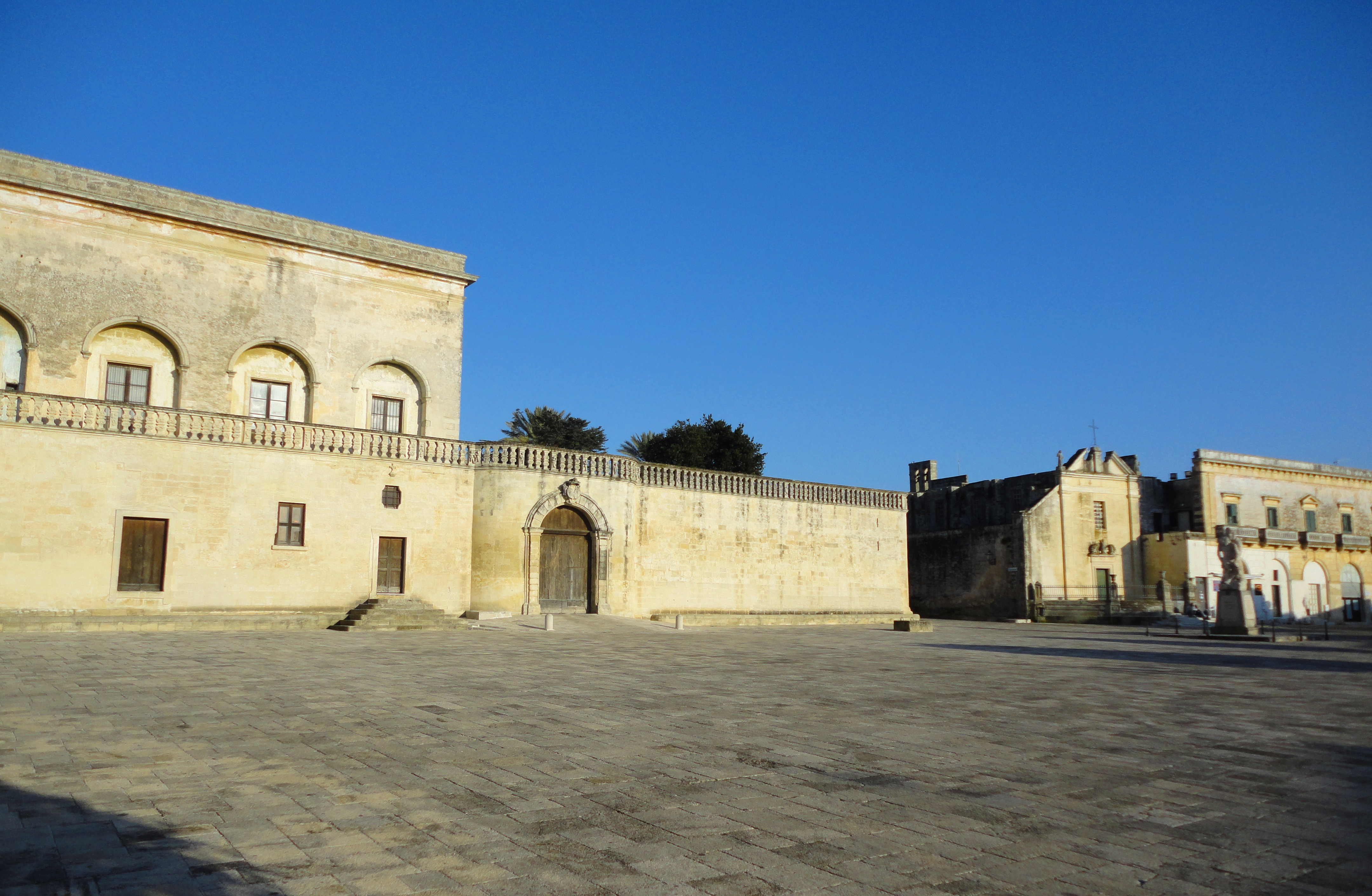 Piazza Indipendenza Botrugno, Lecce